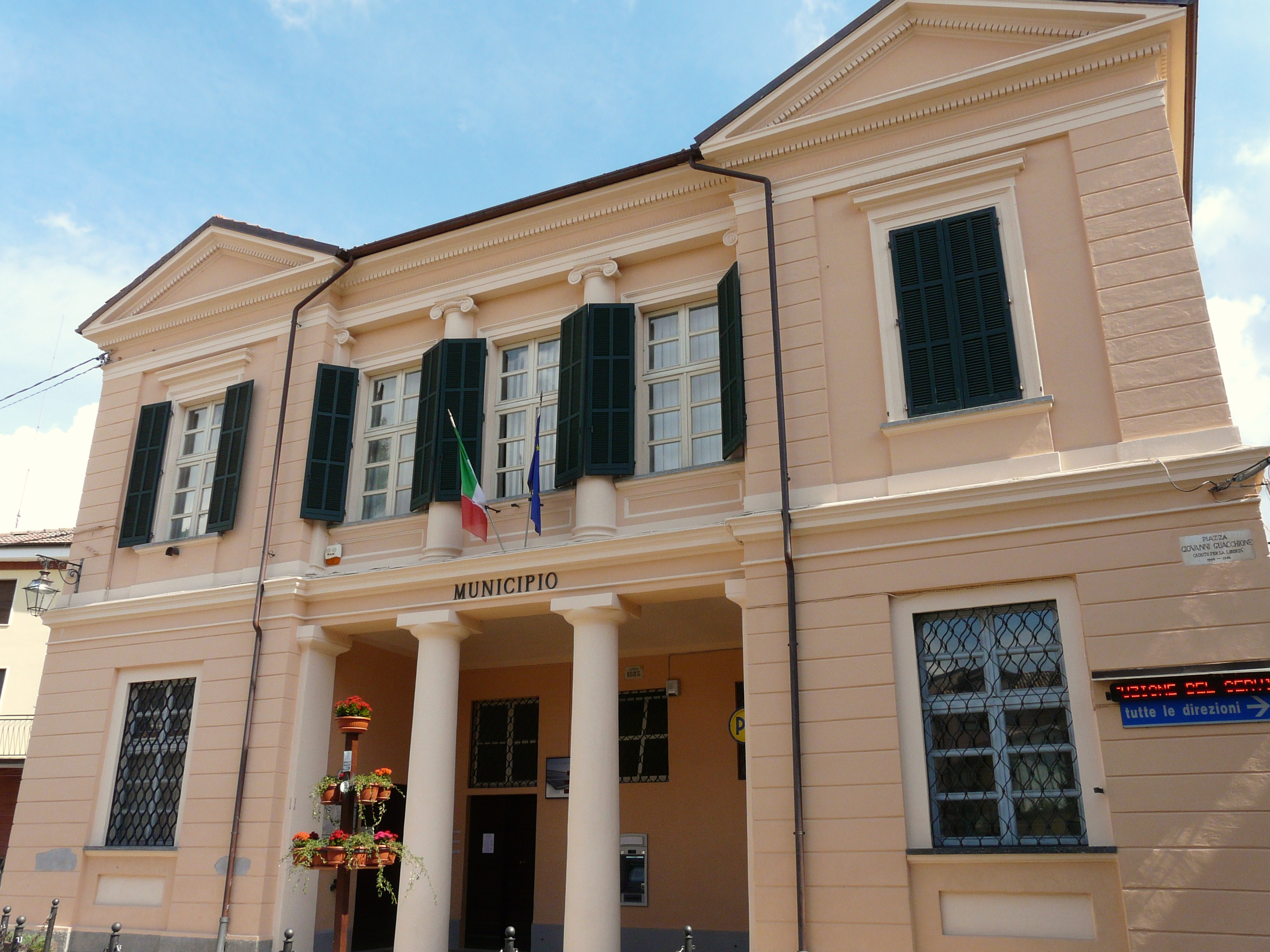 Municipio di Alice Bel Colle, Piemonte, Italia